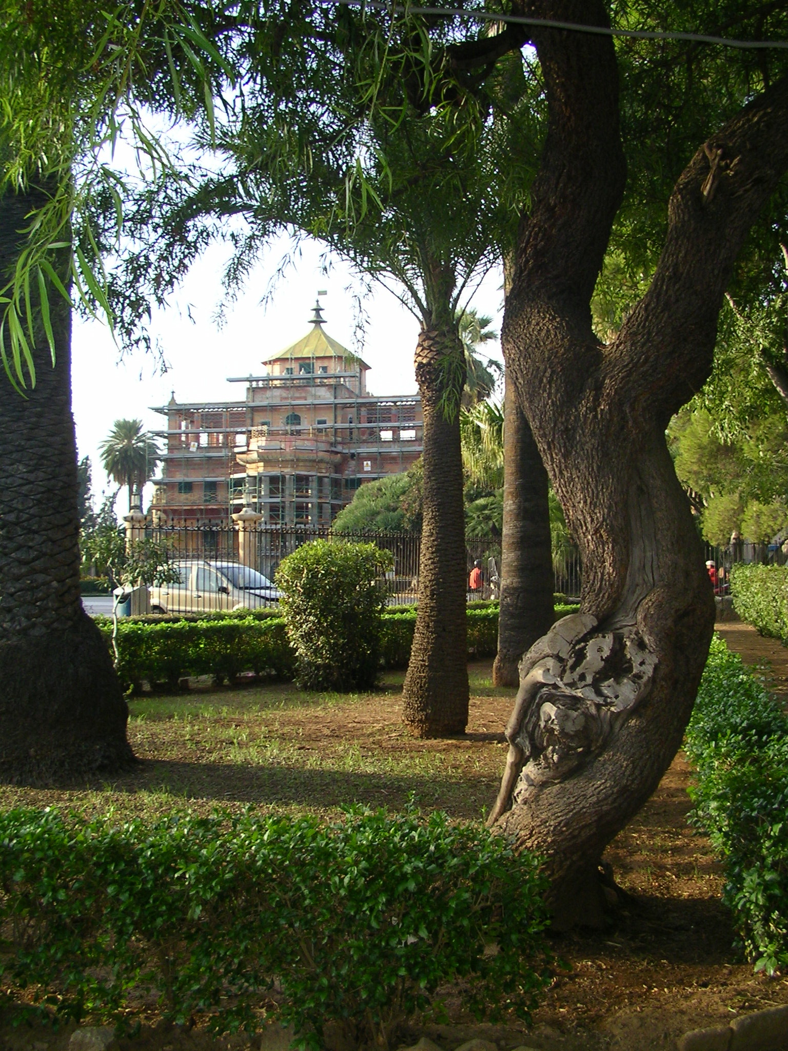 Palazzina Cinese im Parco della Favorita, Palermo